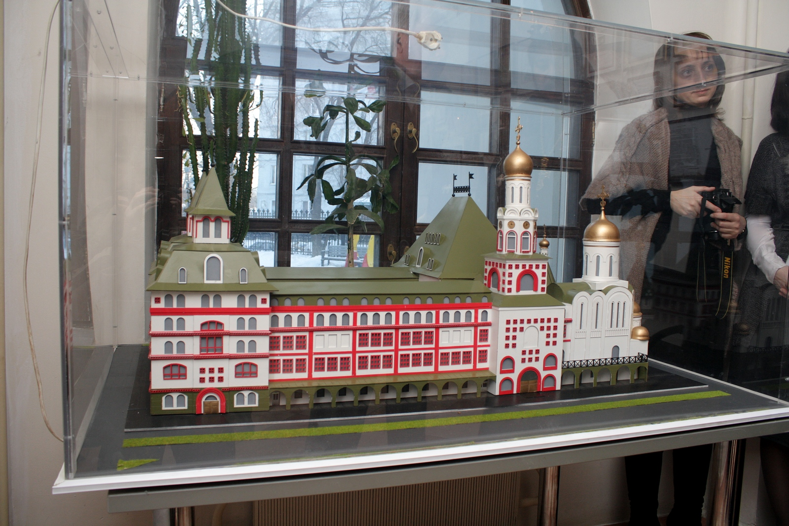 Поволжский православный институт, макет